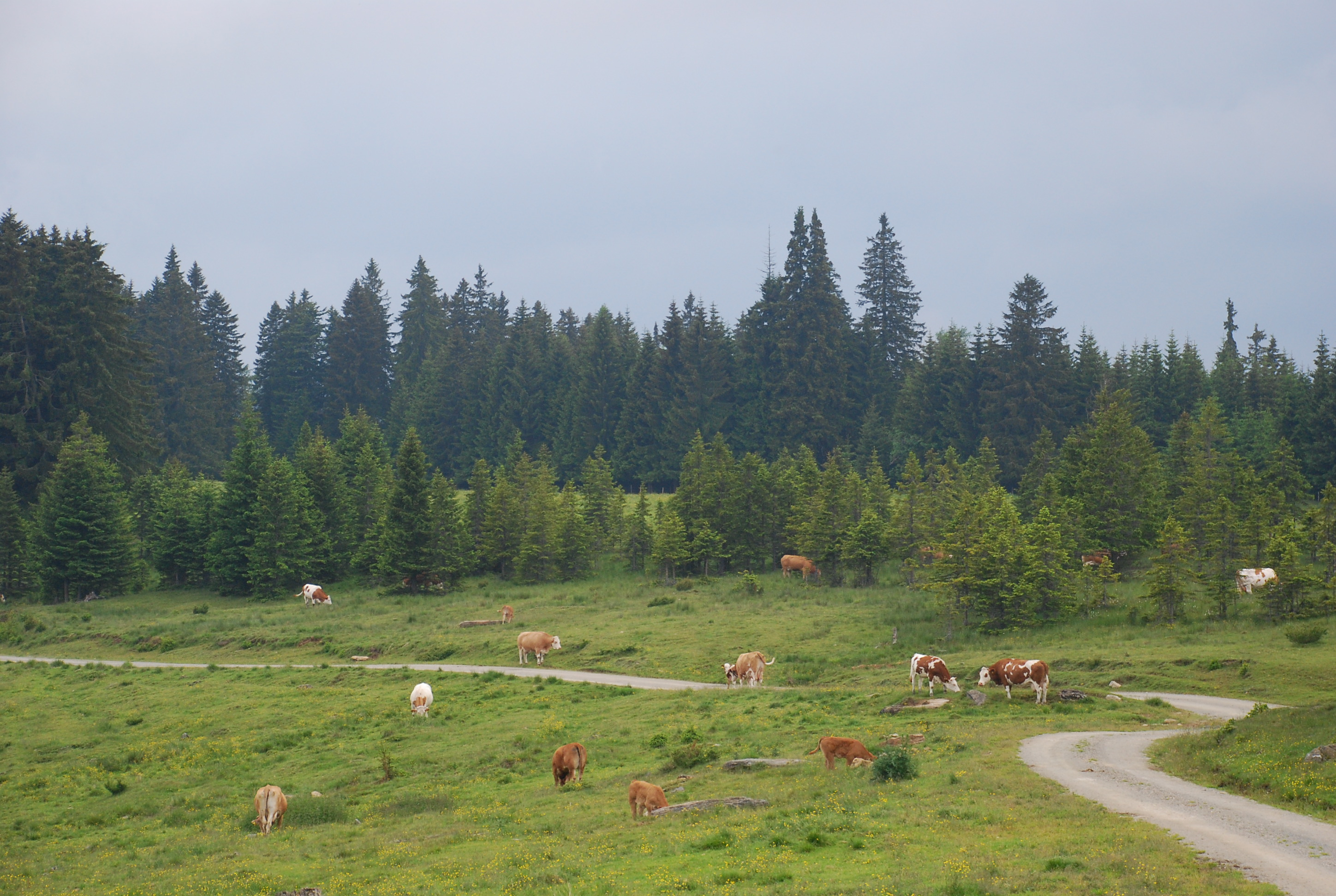 auf der Freiländer Alm